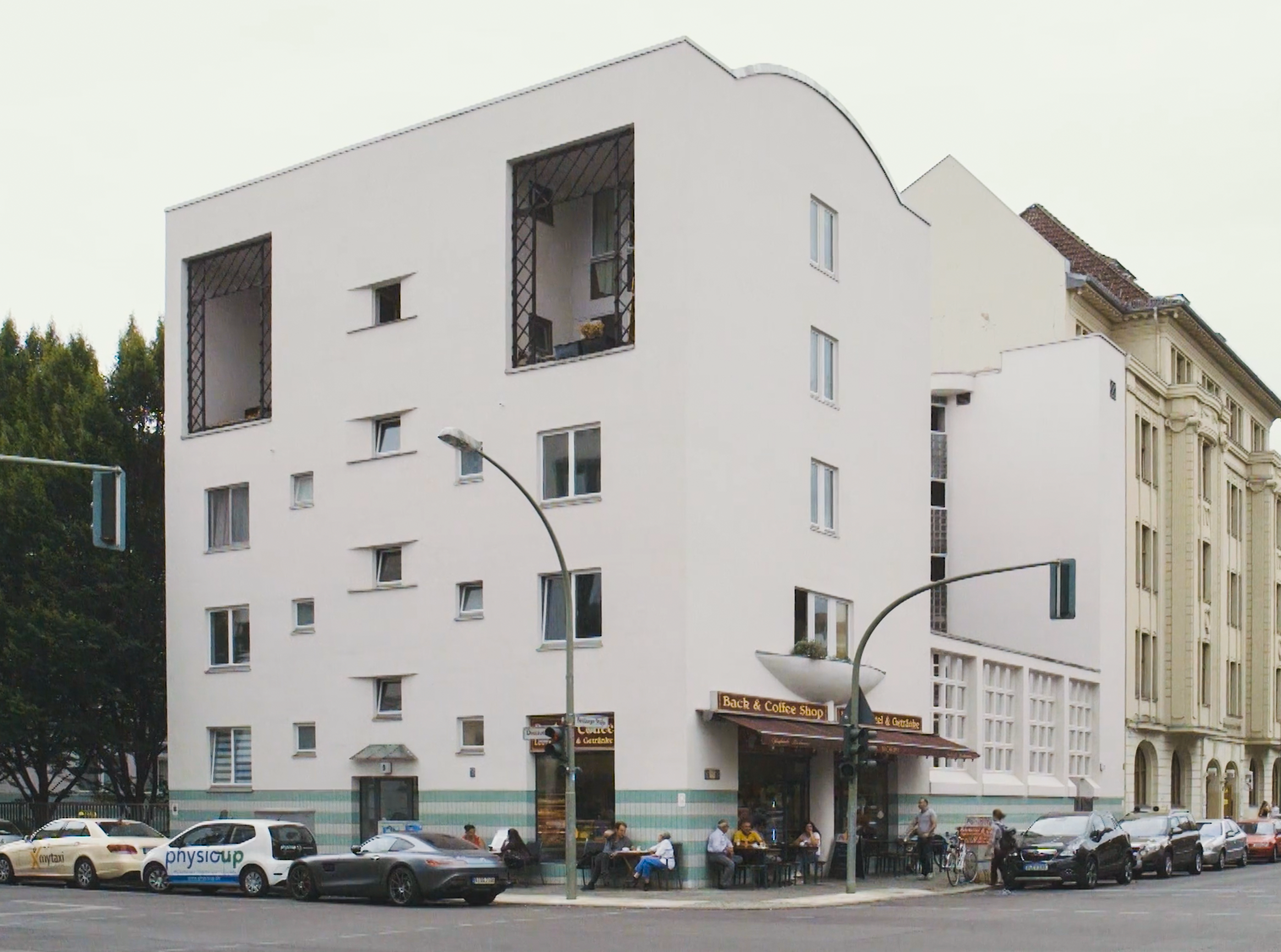 Wohn- und Geschäftshaus, Dessauer Straße / Bernburger Straße, Berlin